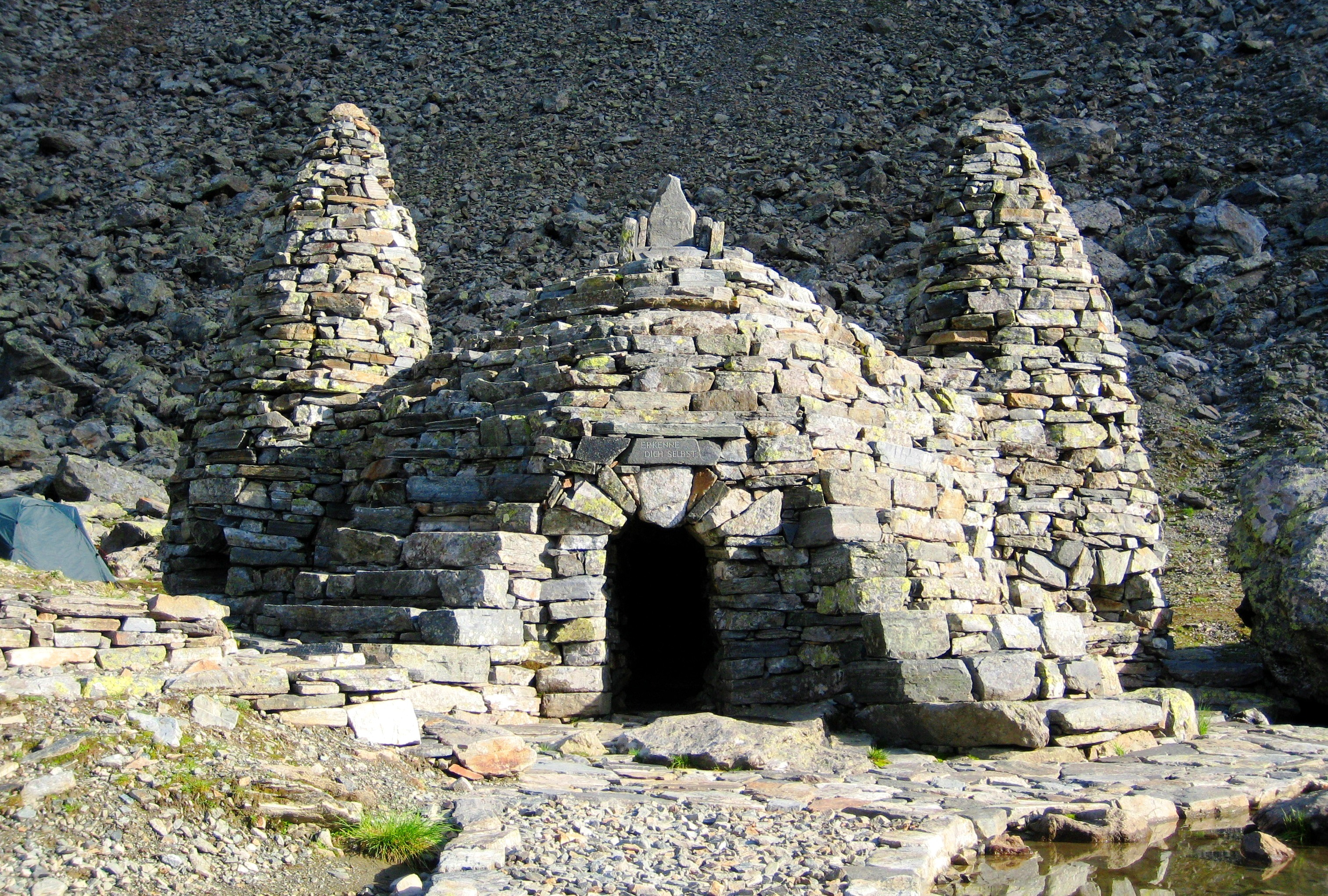 Apollontempel am Hundstalsee (Österreich).